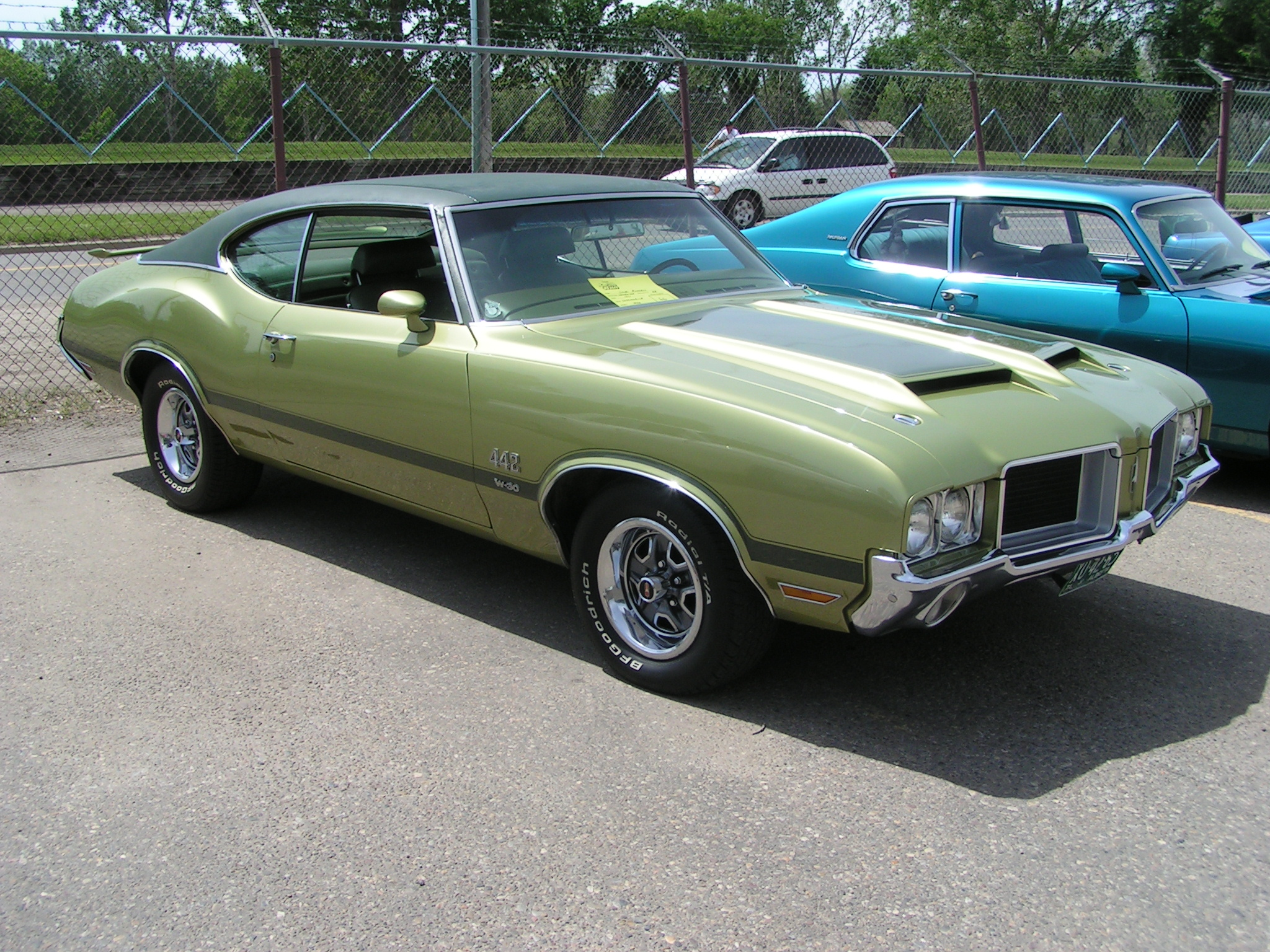 1971 Oldsmobile 442